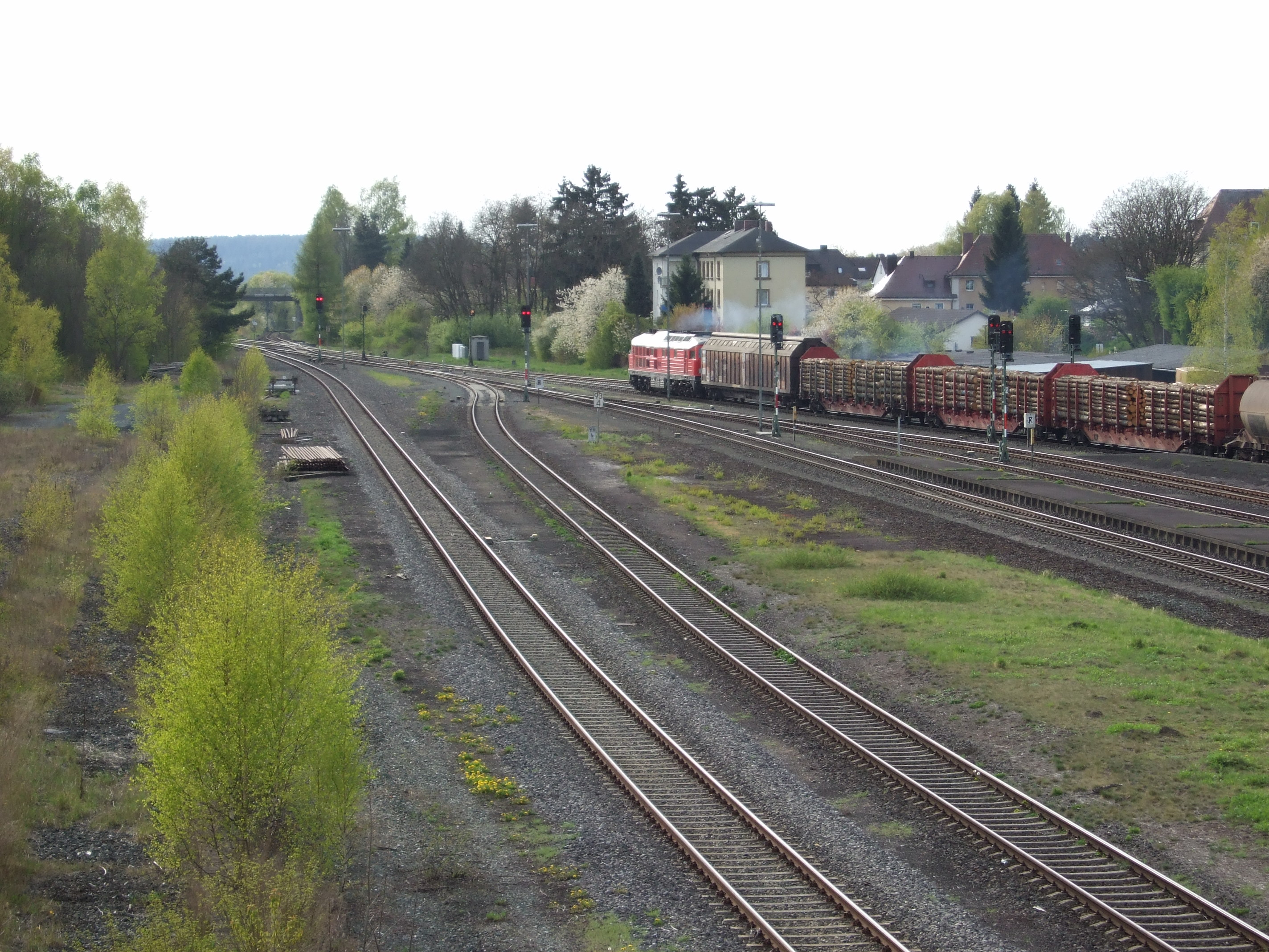 Bahnhof Kirchenlaibach Westkopf